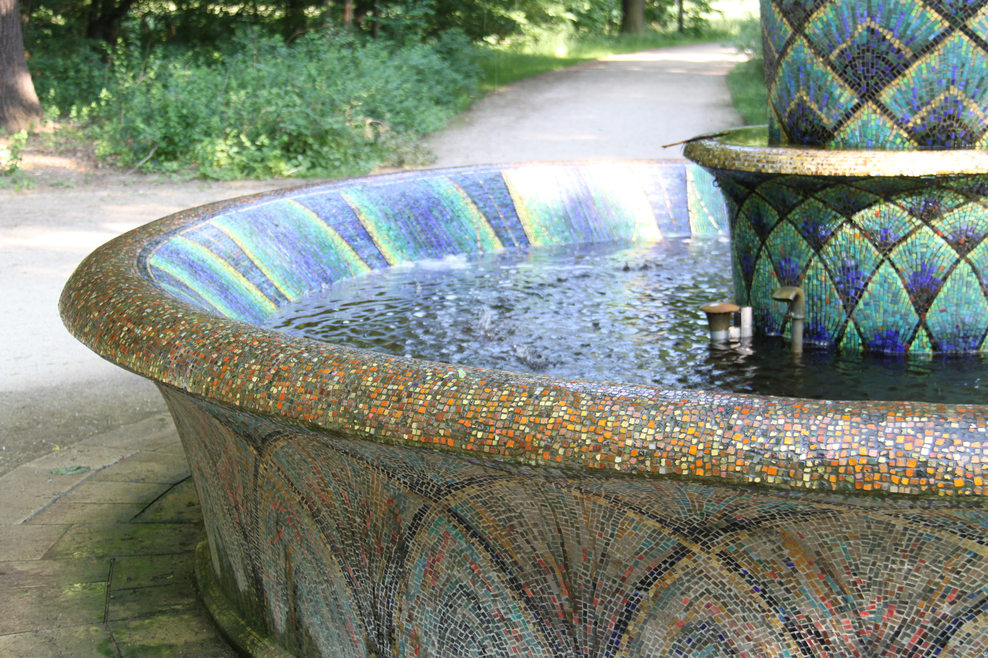 Impressionen Dresden